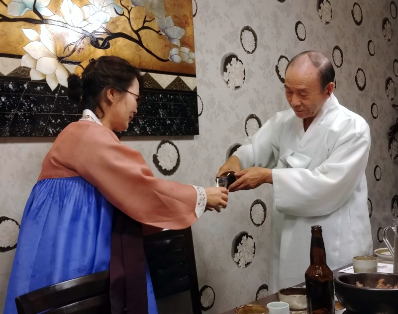 배우자 청송 심씨의 환갑잔치에서